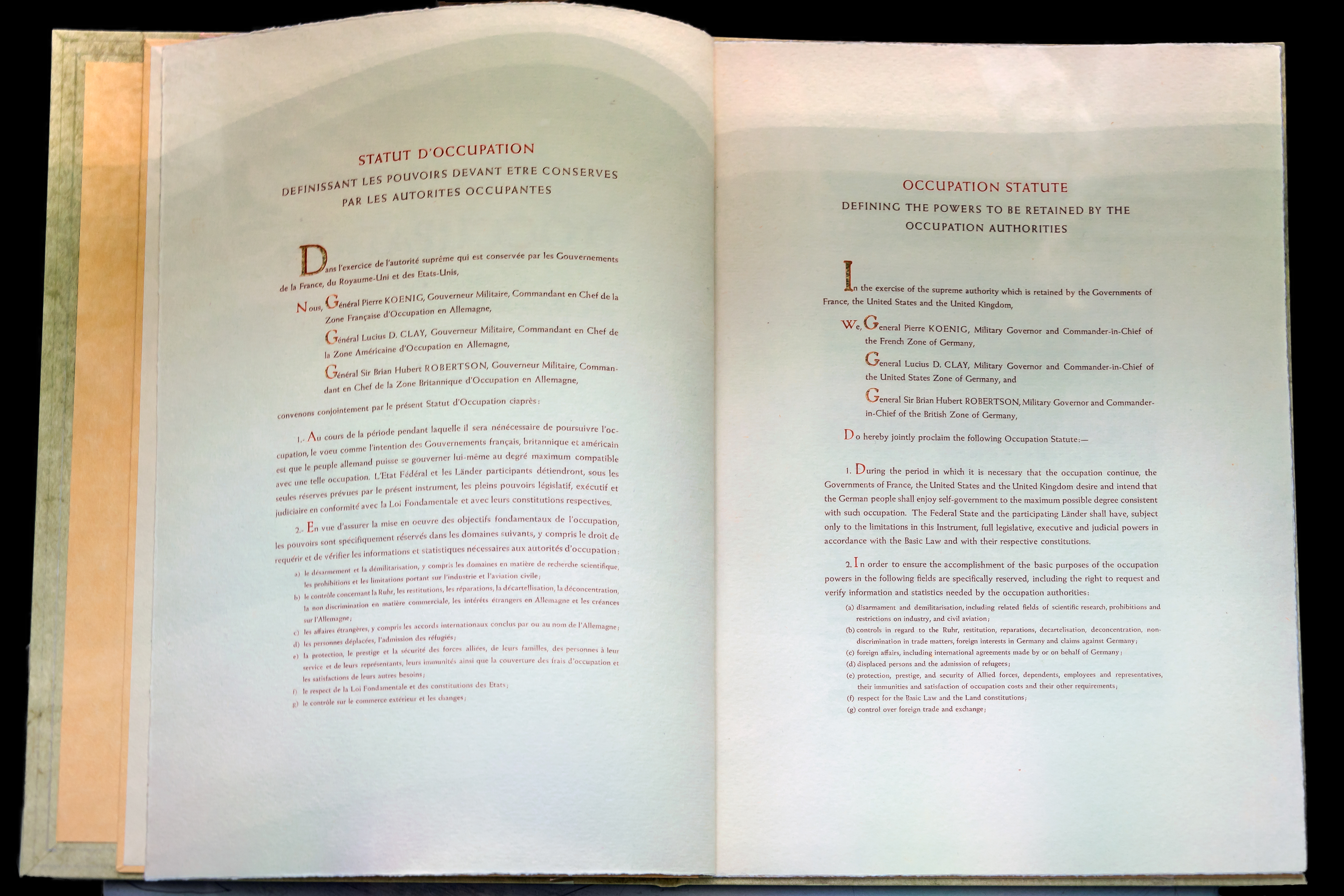 Das Besatzungsstatut im Original. Konrad Adenauer nahm das Statut am 21. September 1949 nicht persönlich entgegen, sondern ließ das Gründungsdokument der Bundesrepublik Deutschland am Hotel Petersberg in Bonn über einen Beamten der Hohen Kommission an seinen persönlichen Referenten Herbert Blankenhorn übergeben. Das Besatzungsstatut war 50 Jahre lang, bis zum Spätjahr 1999 nicht auffindbar gewesen